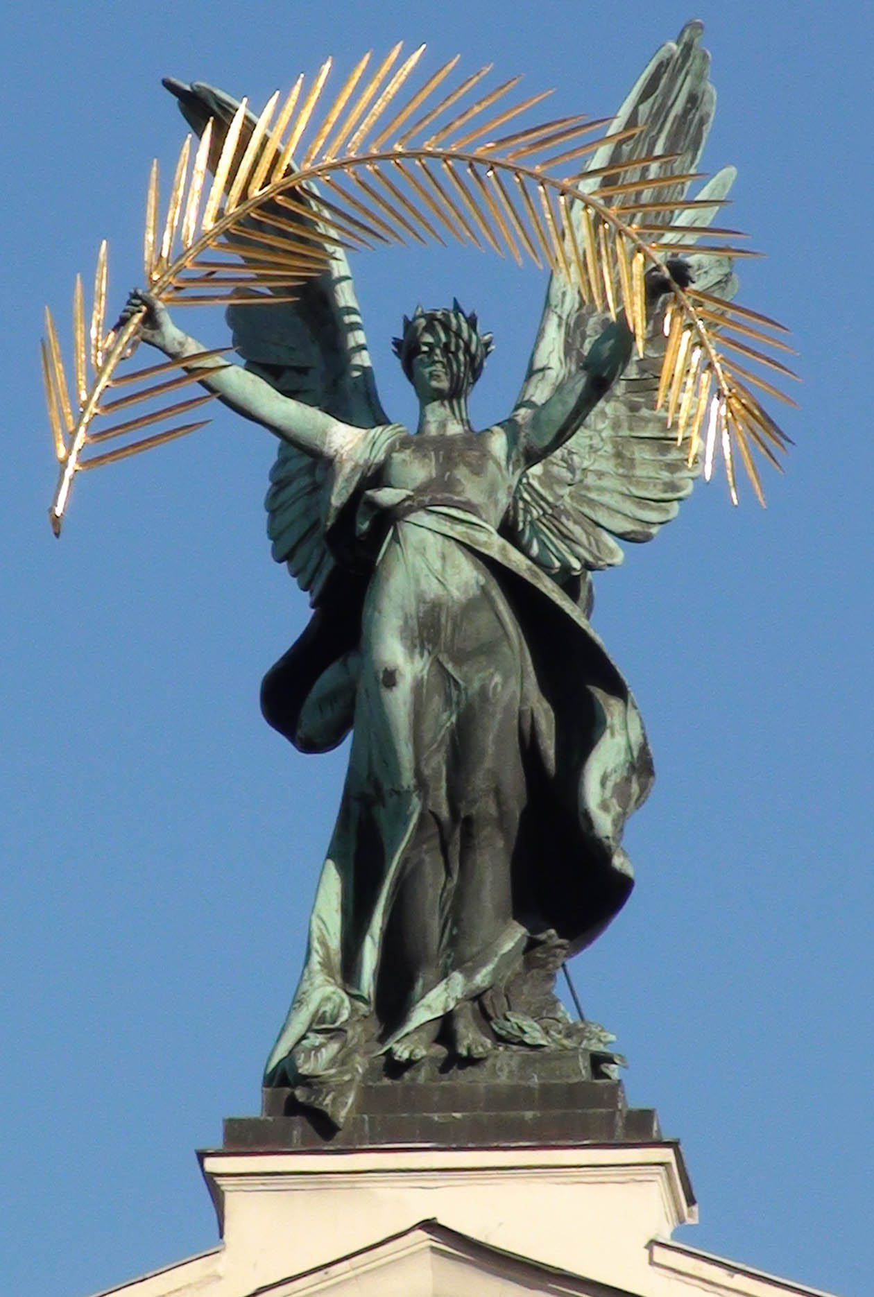 Статуя на Оперному театрі у Львові. Автор Петро Вуйтович (1862—1936).